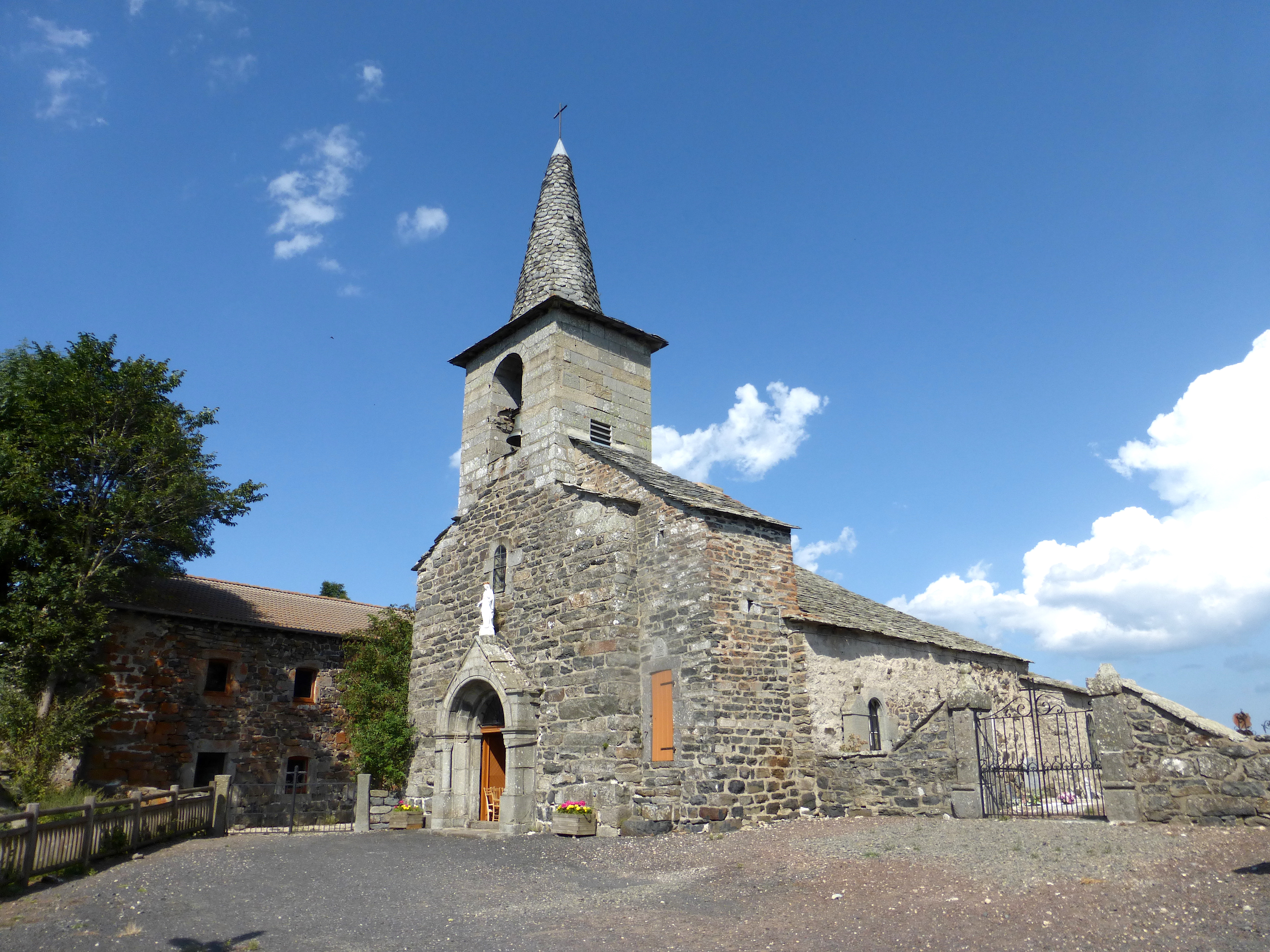 L'église de Champclause, au Bourg. Champclause (Haute-Loire) Août 2017